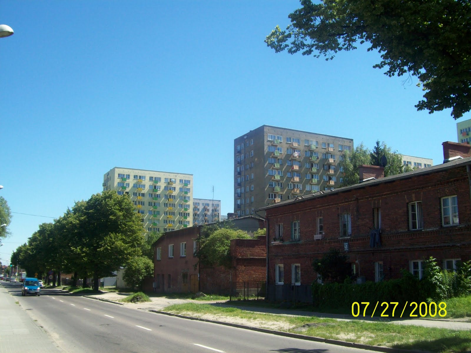 Gdańsk Orunia, ul. Małomiejska.